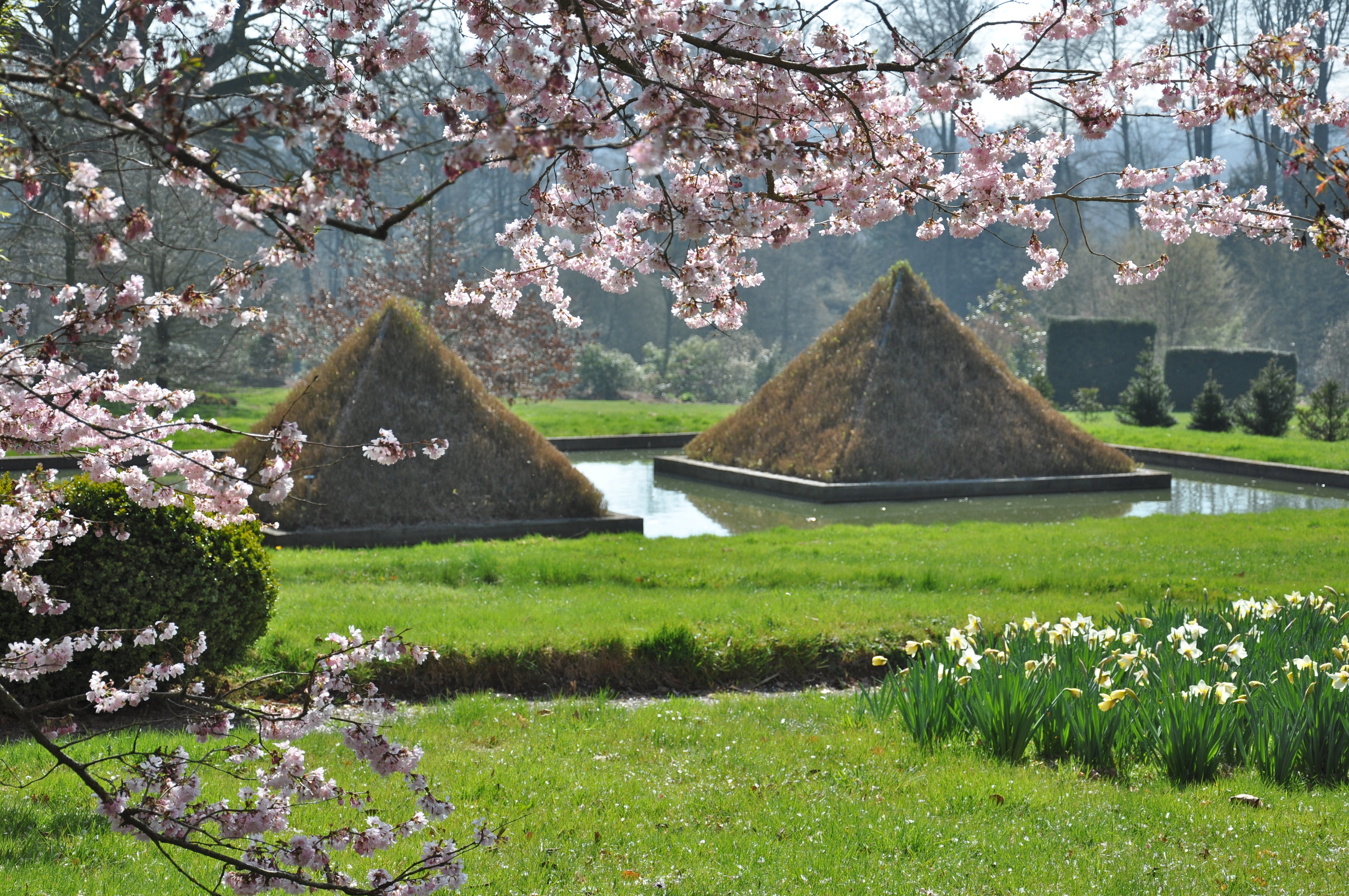 au Parc Botanique de Haute Bretagne en mars 2011